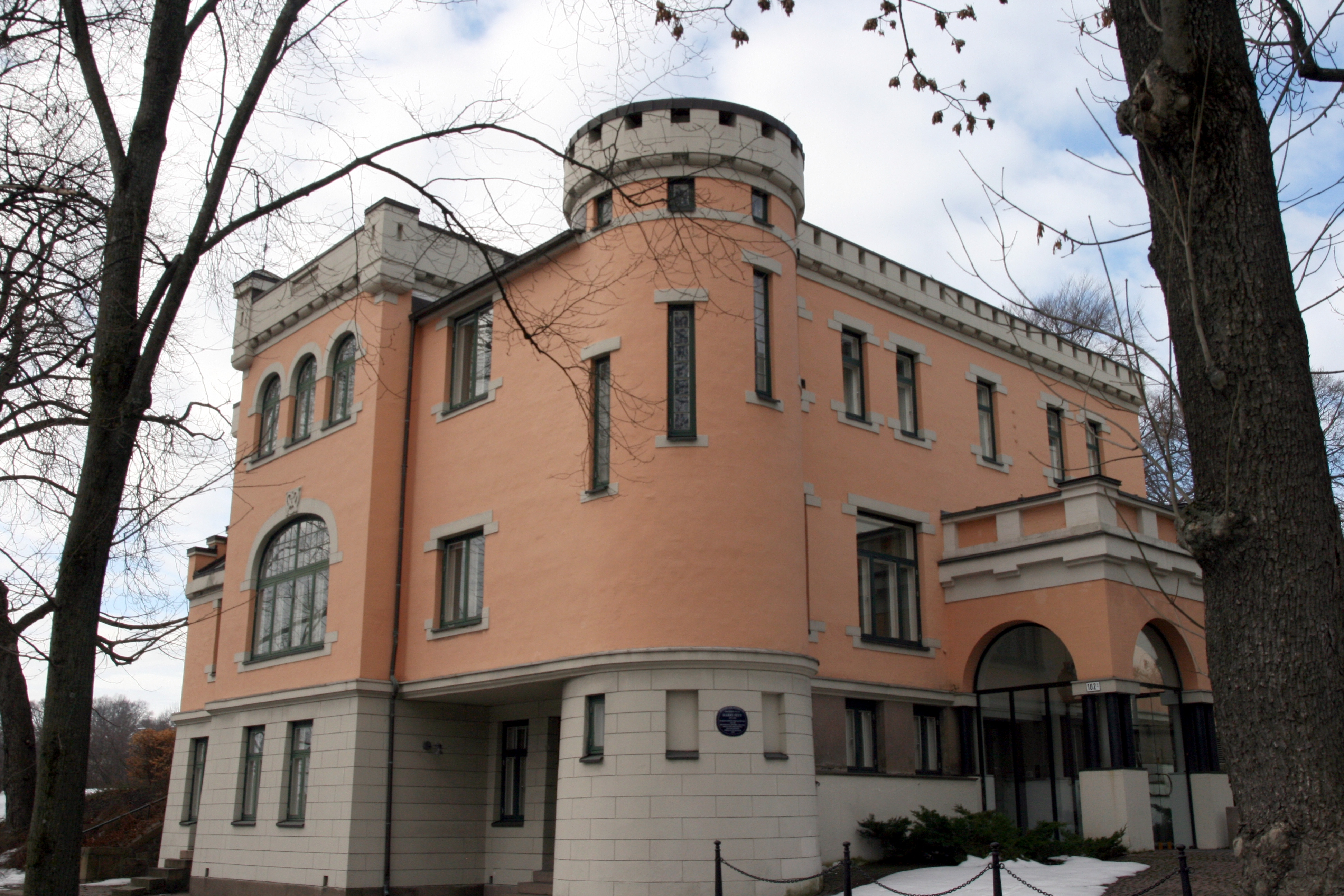 Drammensveien 102h på Skarpsno i Oslo. Bygningen ble tegnet av arkitekt Ingvar Olsen Hjorth, og oppført 1898. Riksantikvar Harry Fett bodde her i mange år, noe som gav villaen tilnavnet «Villa Fett». Bygningen har huset kontorer siden 1992.